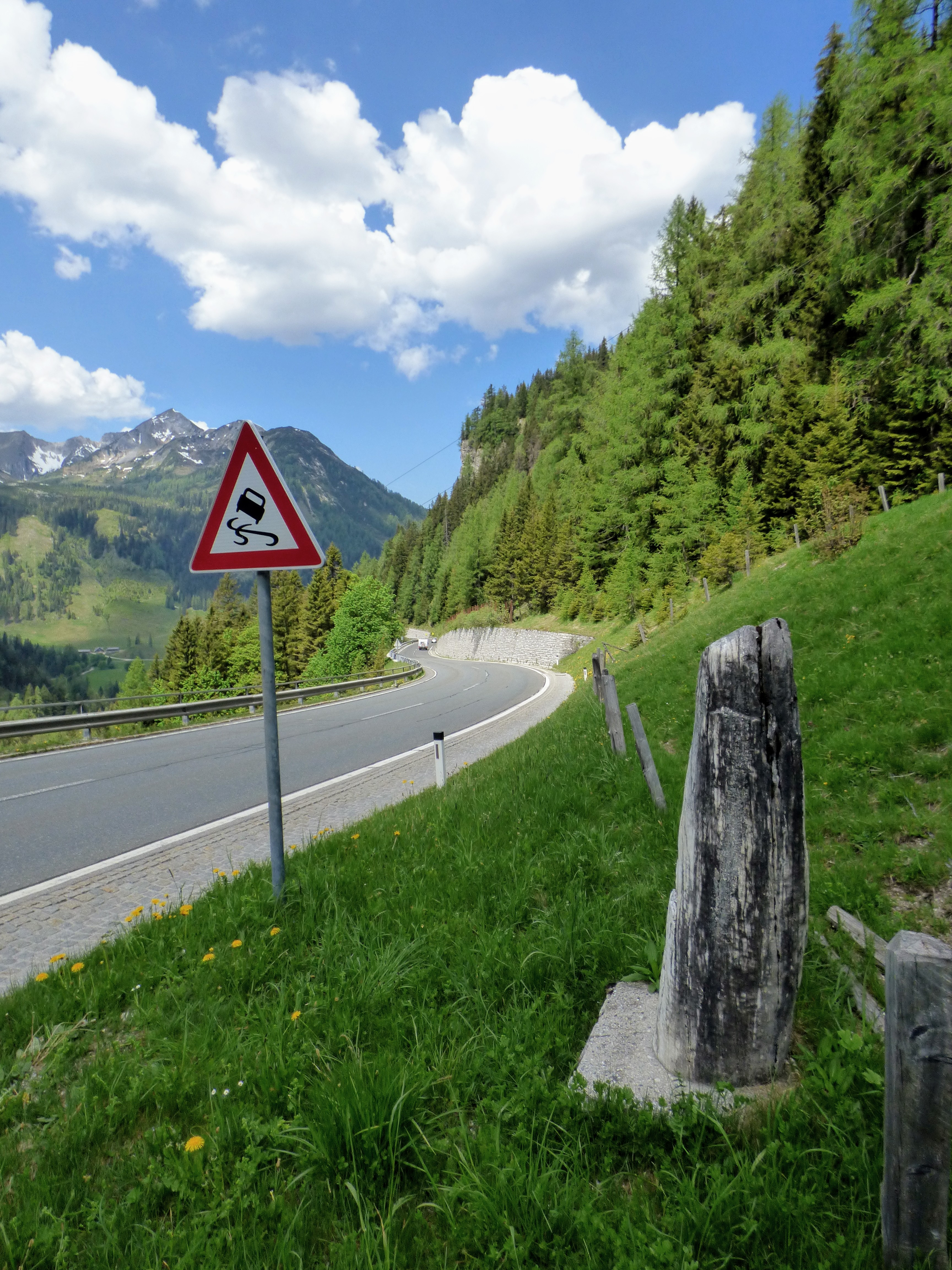 Römischer Meilenstein, am Radstädter Tauernpass, Gemeinde Untertauern